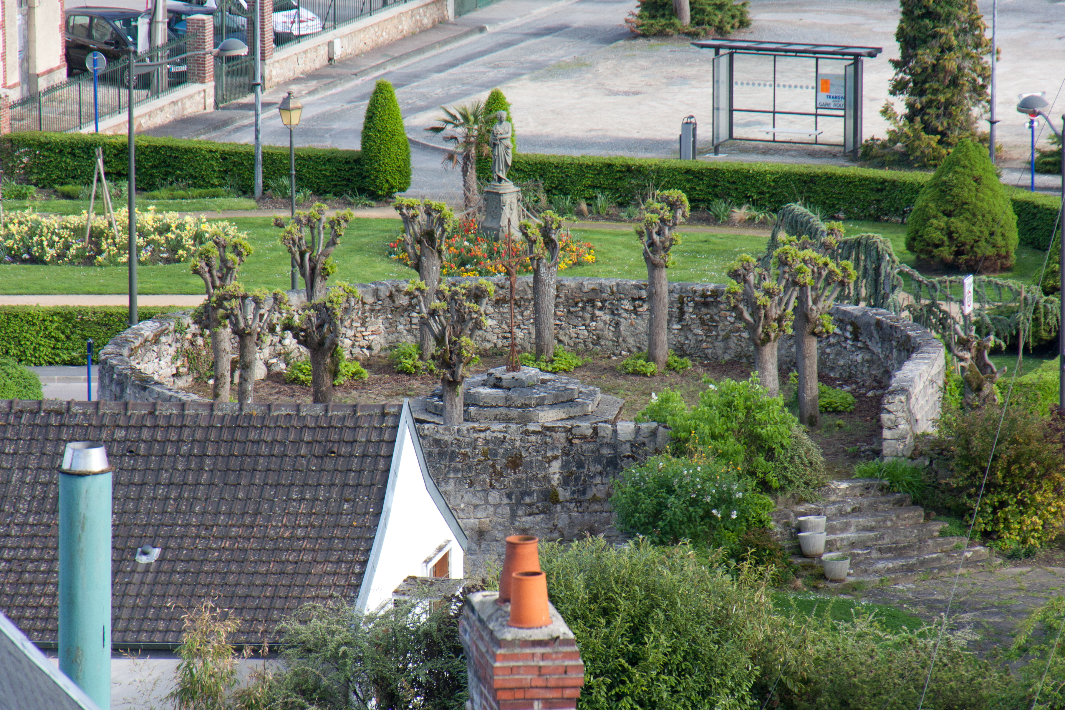 La tour des Augustines dans l'enceinte de l'Hôtel-Dieu de Château-Thierry, vue des remparts du château médiéval. Cette tour abrite les tombes des soeurs qui étaient chargées de la gestion de l'Hôtel-Dieu.